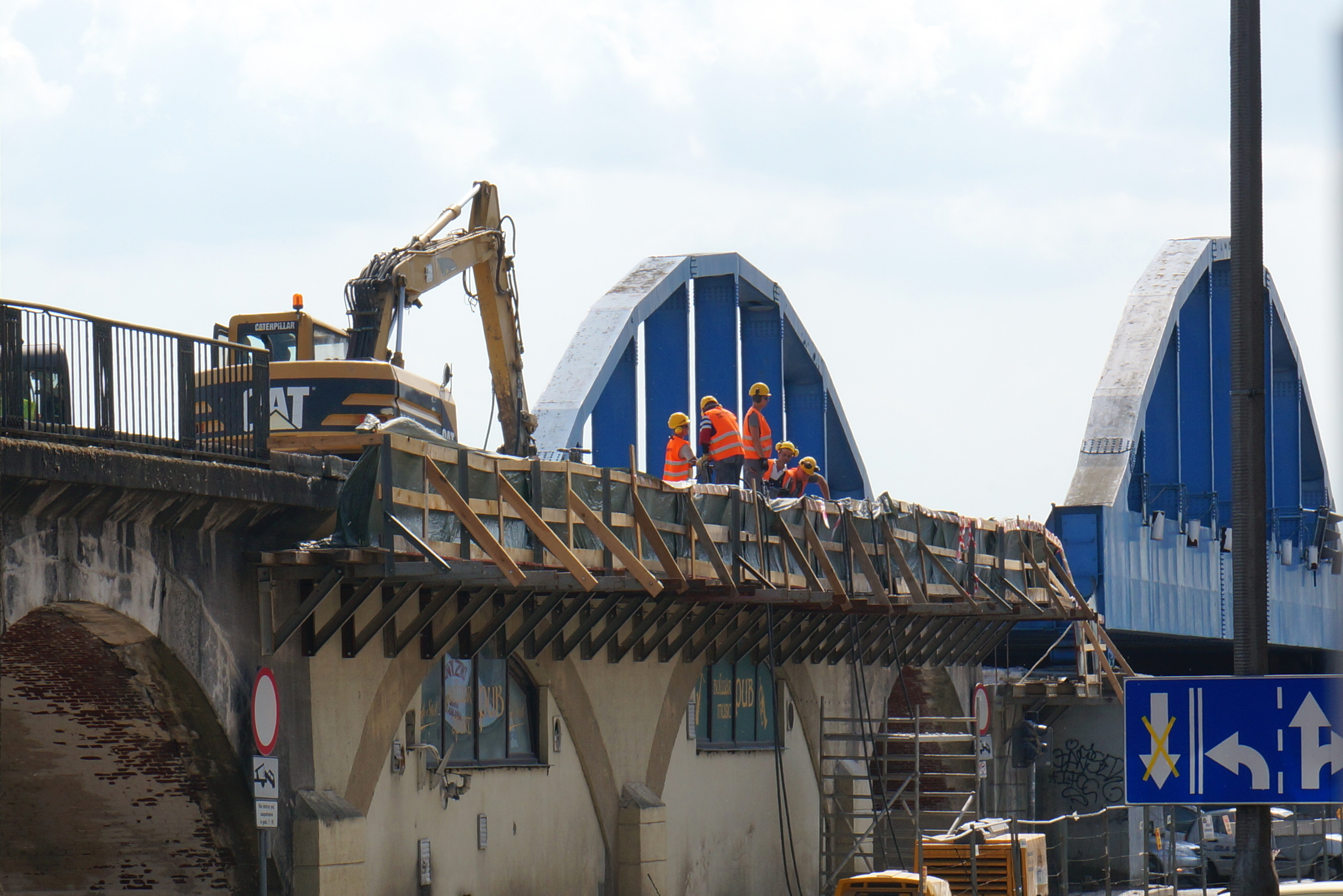 Remont estakady kolejowej w Gorzowie Wlkp. Odcinek z wiaduktem nad ul. Chrobrego.